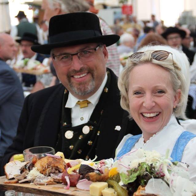 Stefan Loewl, privat